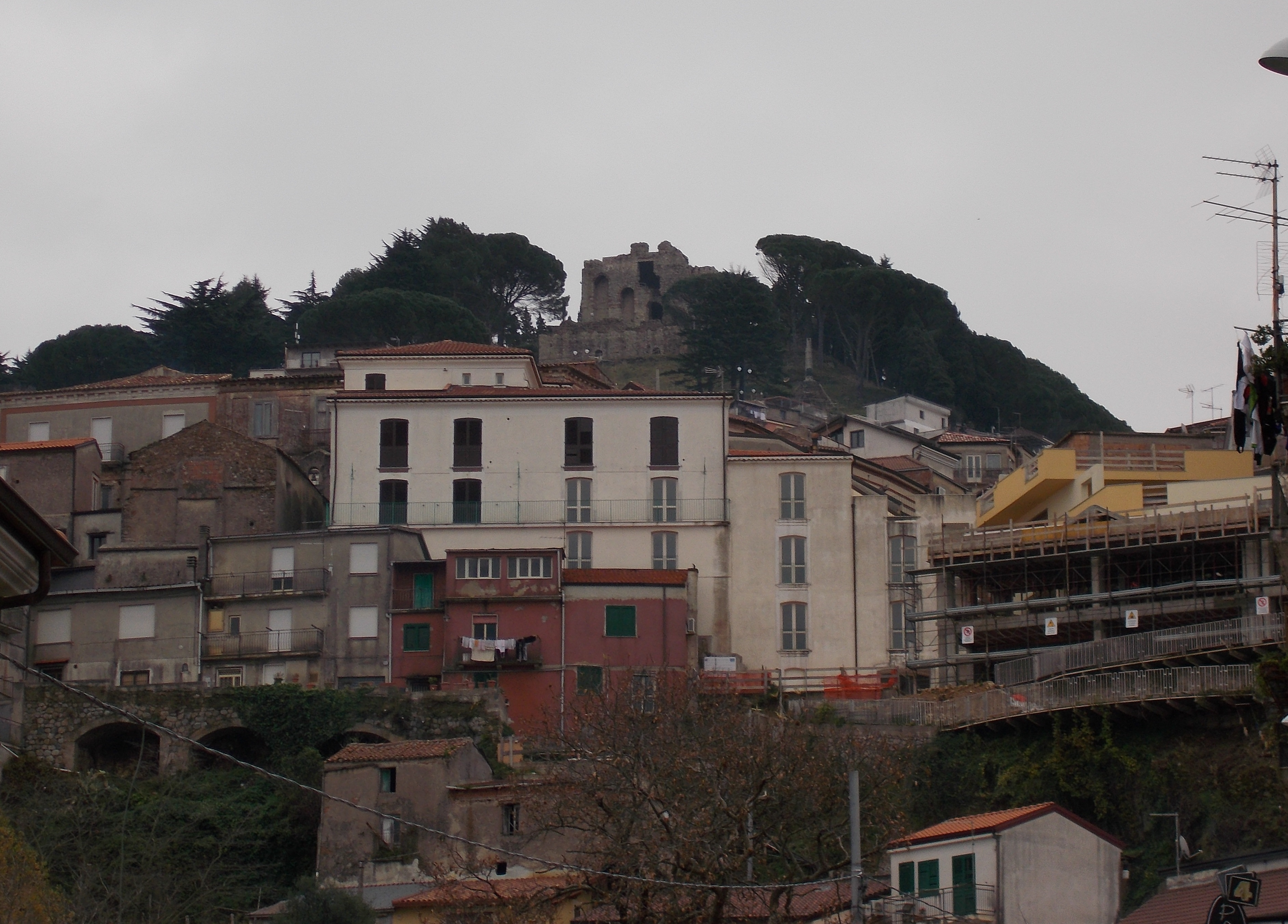 San Giorgio Morgeto (R.C.), con il castello.